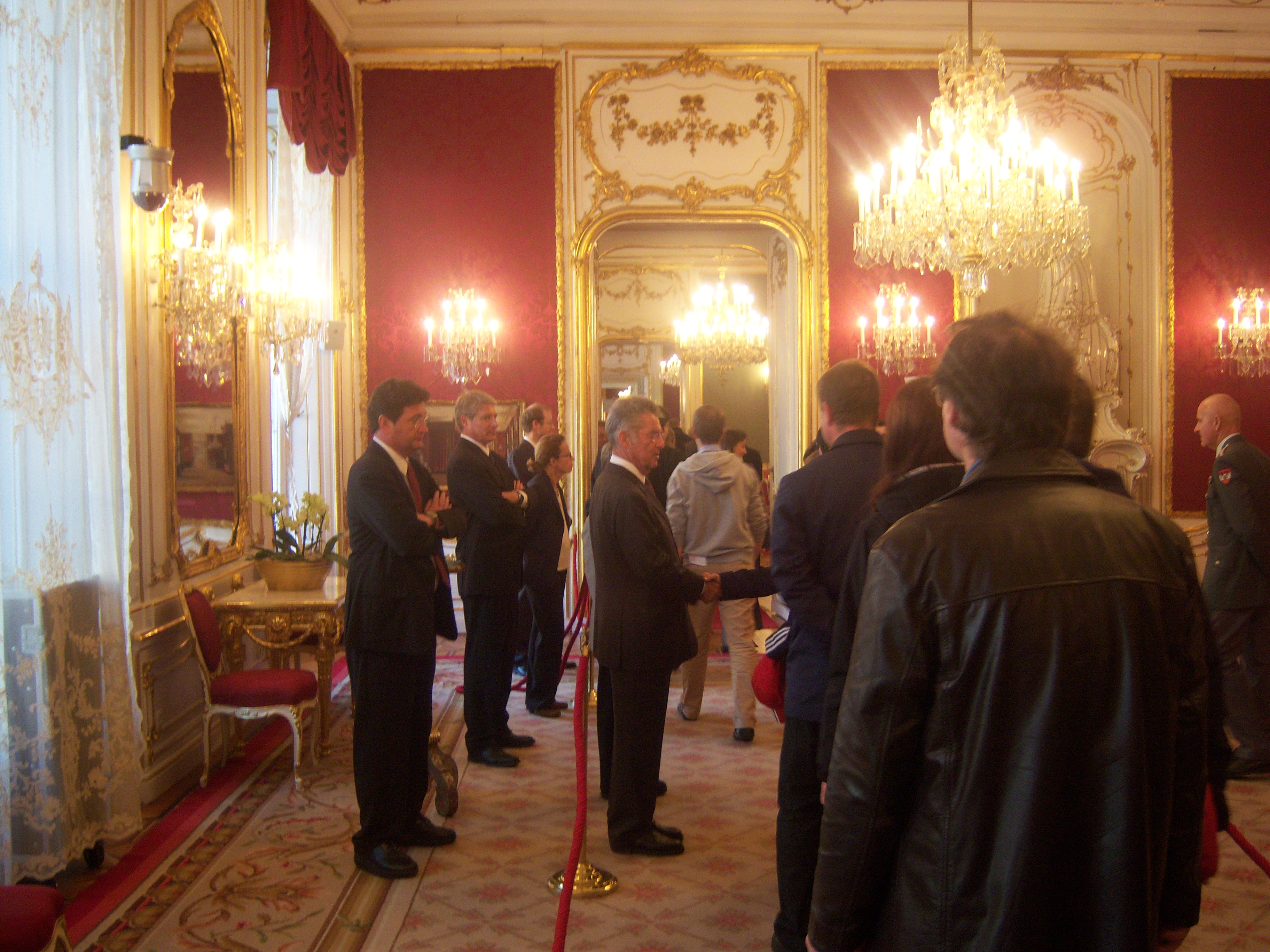 Hofburg, Maria-Theresien-Zimmer, Bundespräsident Heinz Fischer